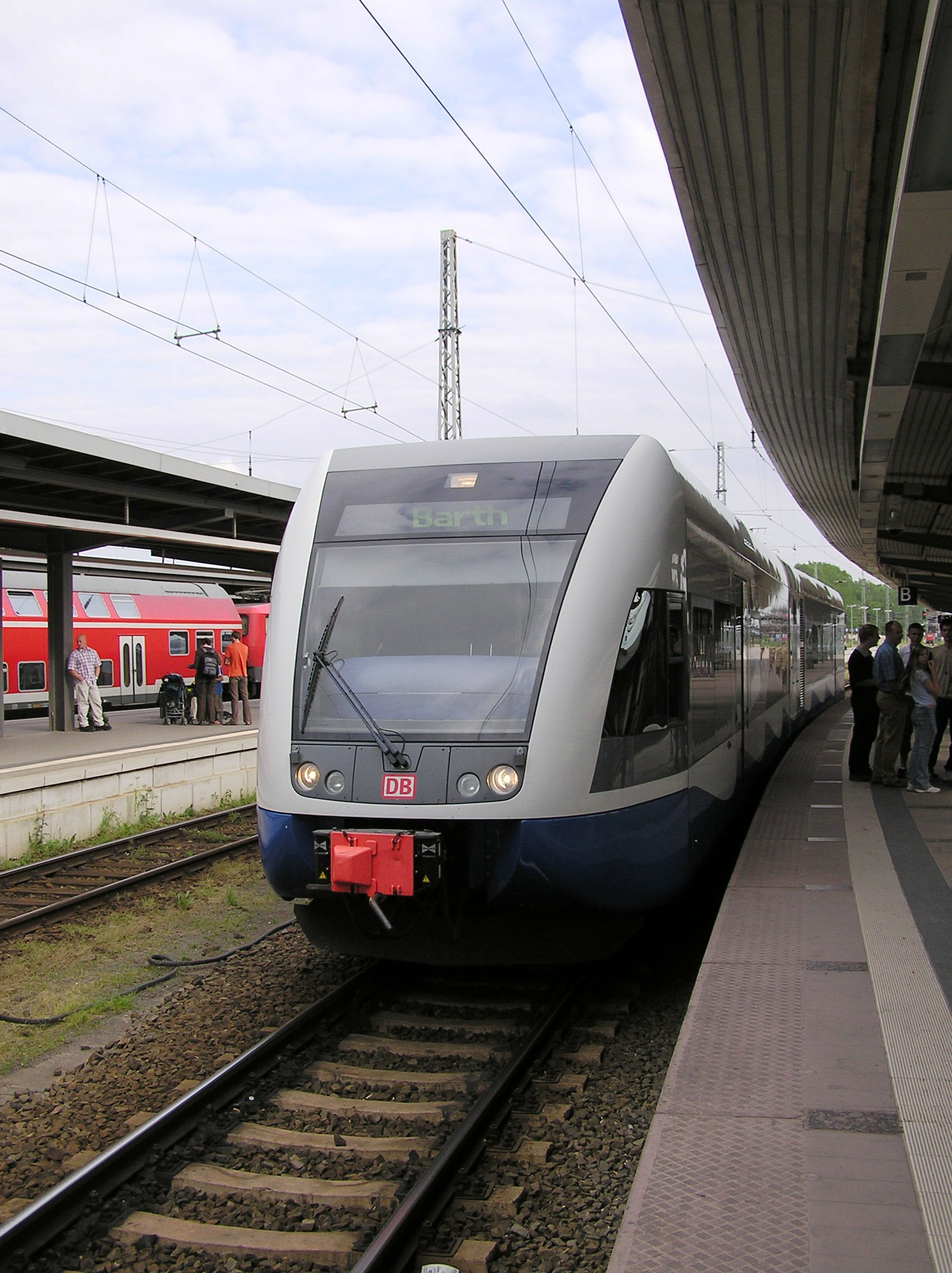 Usedomer Bäderbahn (Richtung Barth) Freigabe: OTRS Ticket#: 2006071310008417